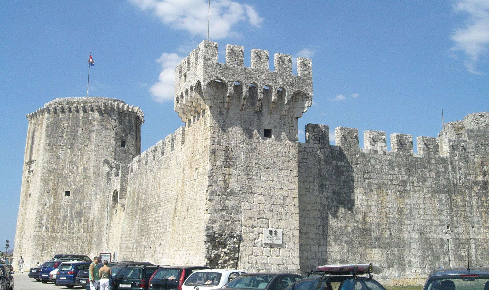 Trogir: Kula Kamerlengo